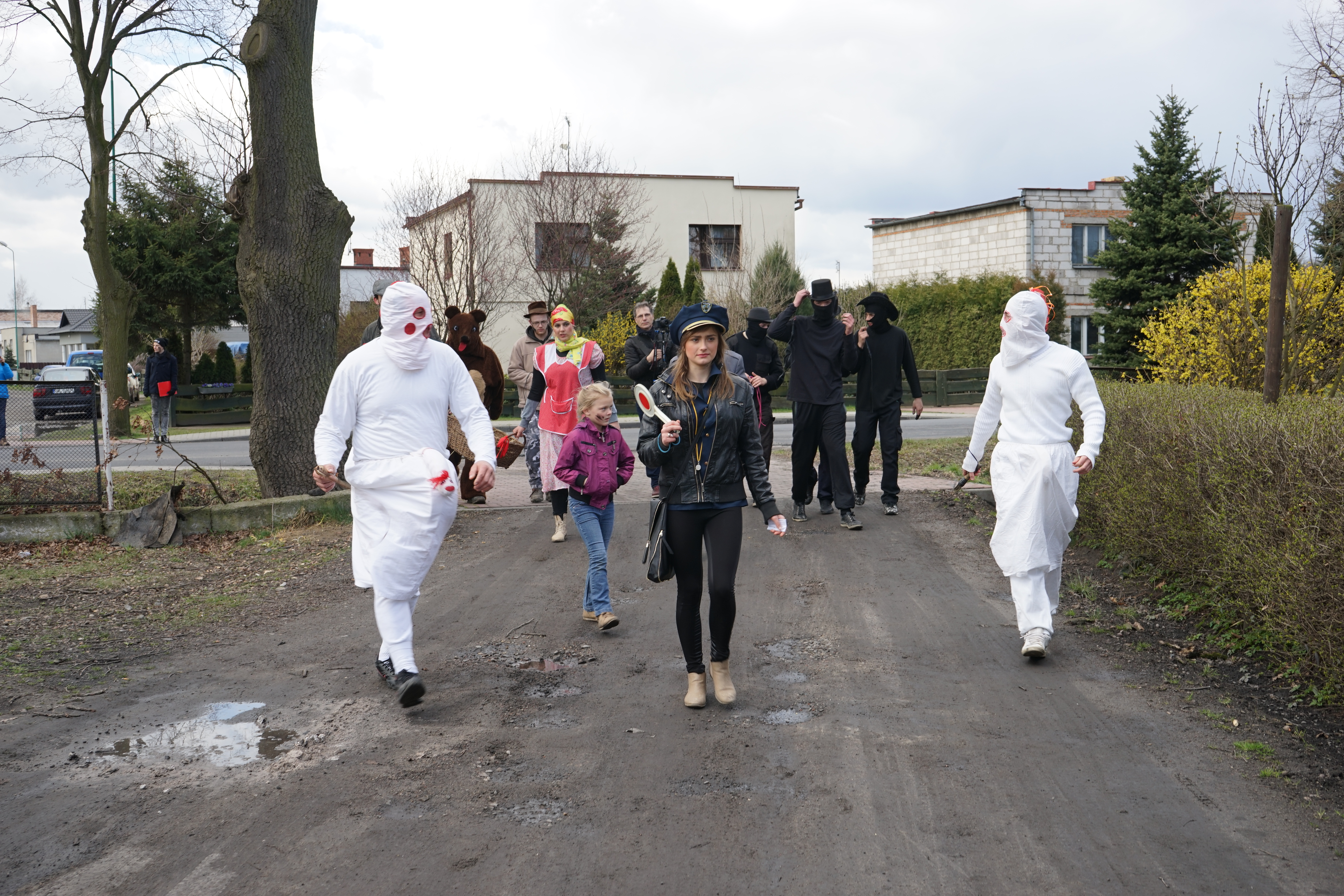 Siwki w Chobienicach odbywają się co roku w pierwszy dzień świąt Wielkanocnych. Grupy przebierańców zatrzymują samochody pobierając opłaty, grają i śpiewają na ulicach malując sadzą twarze mieszkańców, smagają rzemieniami łydki przechodniów. Zbierają dary i rozmawiają z chętnymi do udziału mieszkańcami. Pochód trwa od godzin południowych do późnego popołudnia.